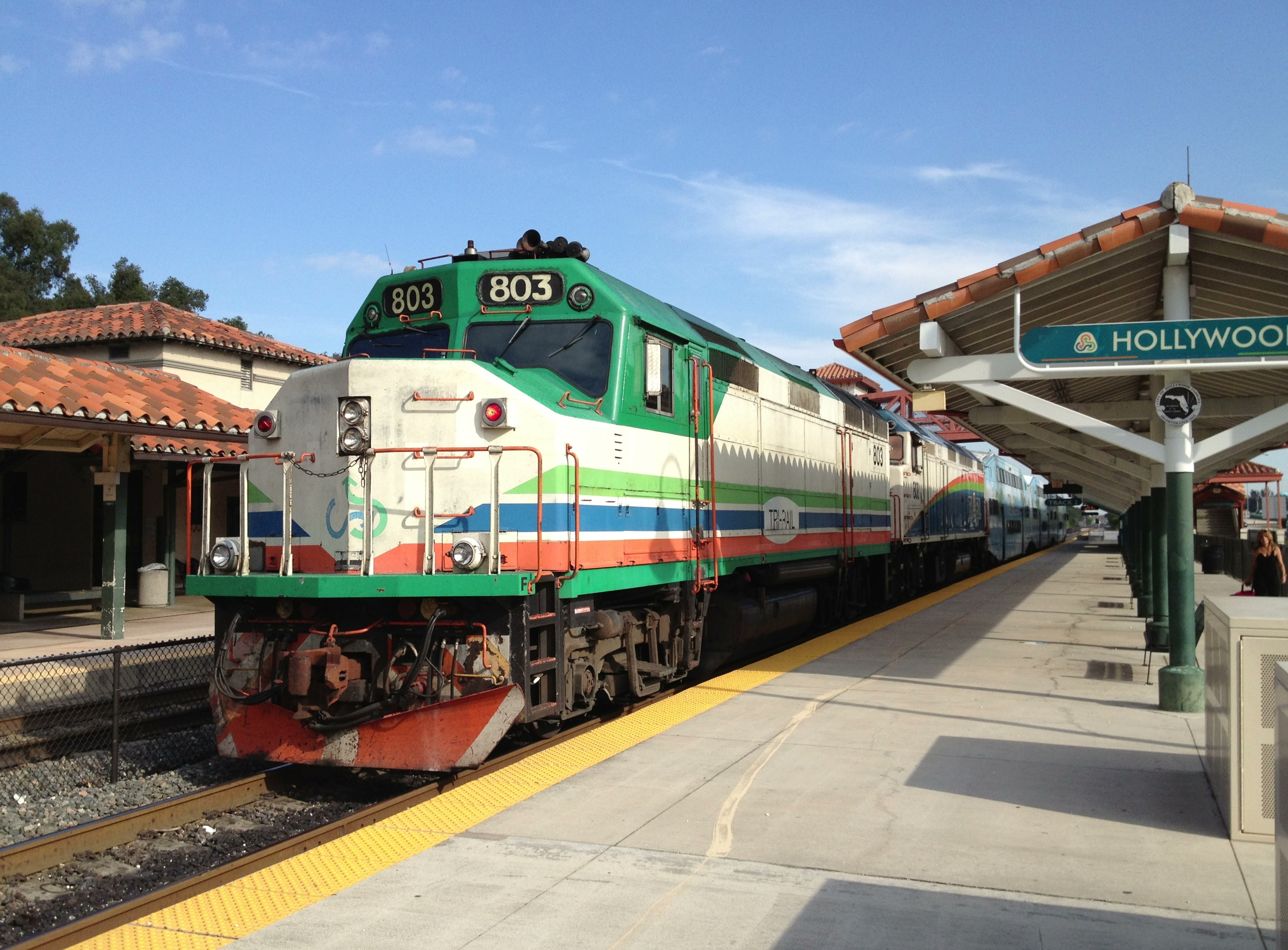 MK F40PHL-2 Locomotive.